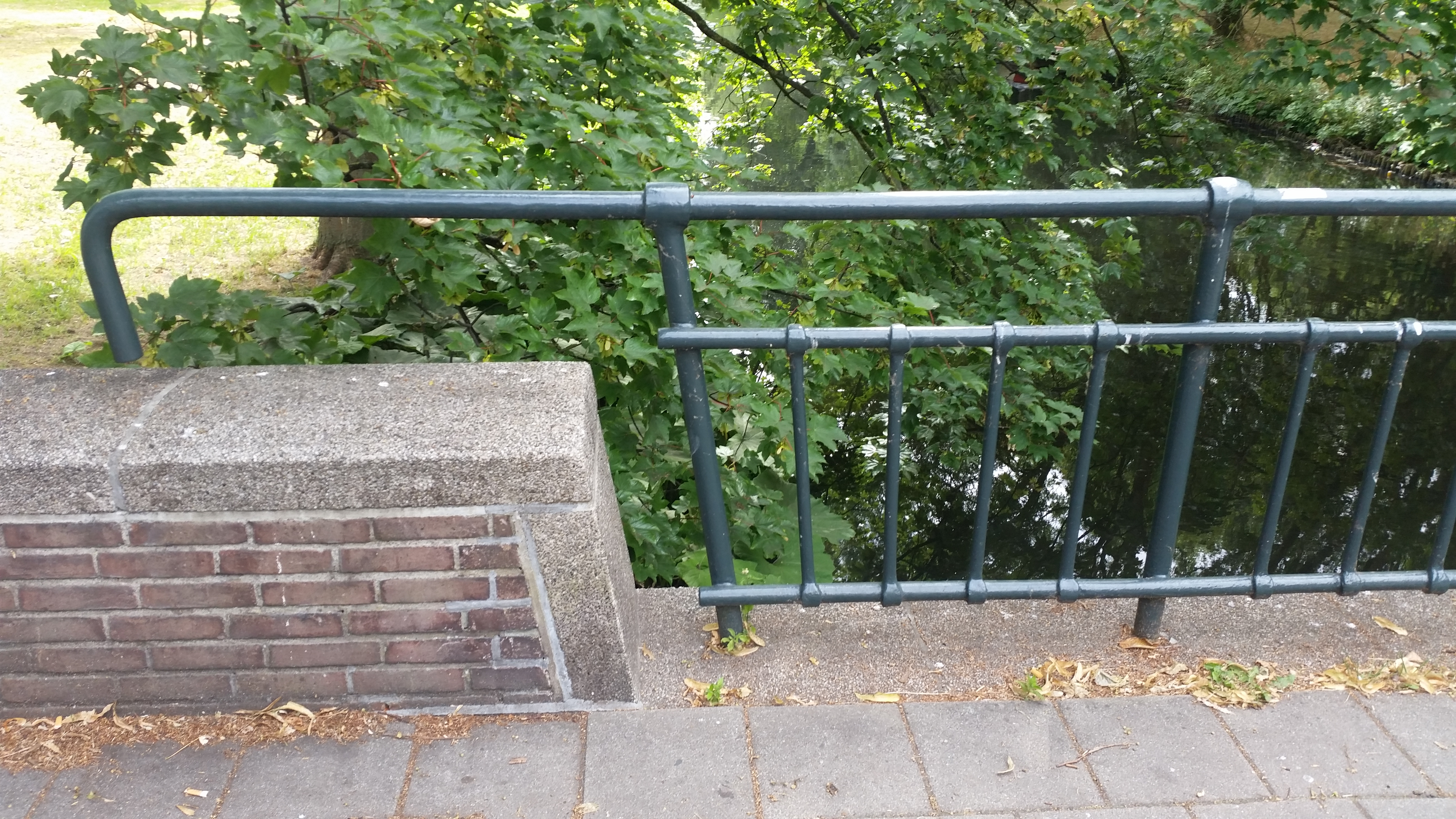 Brug 618 (in Amsterdam), overgang balustrade, leuning met afbuiging